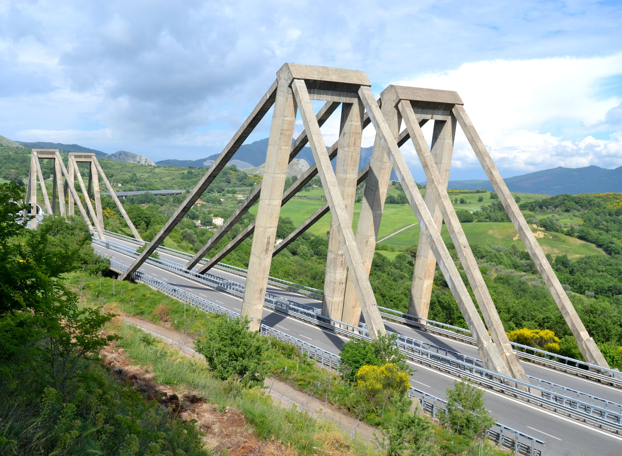 Viadotto Carpineto sull'raccordo autostradale 5